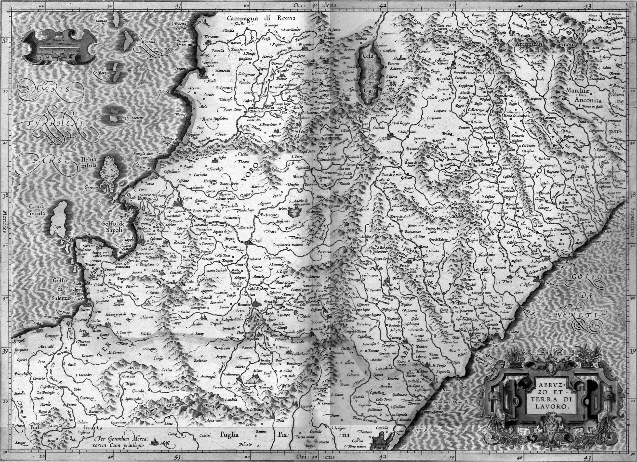 Abruzzo et terra di lavoro in "Italiae, Sclavoniae, et Greciae tabule geographice, Per Gerardum Mercatorem Illustrissimi Ducis Julie Clivie, & c. Cosmographum Duysburgi editae, 1589"